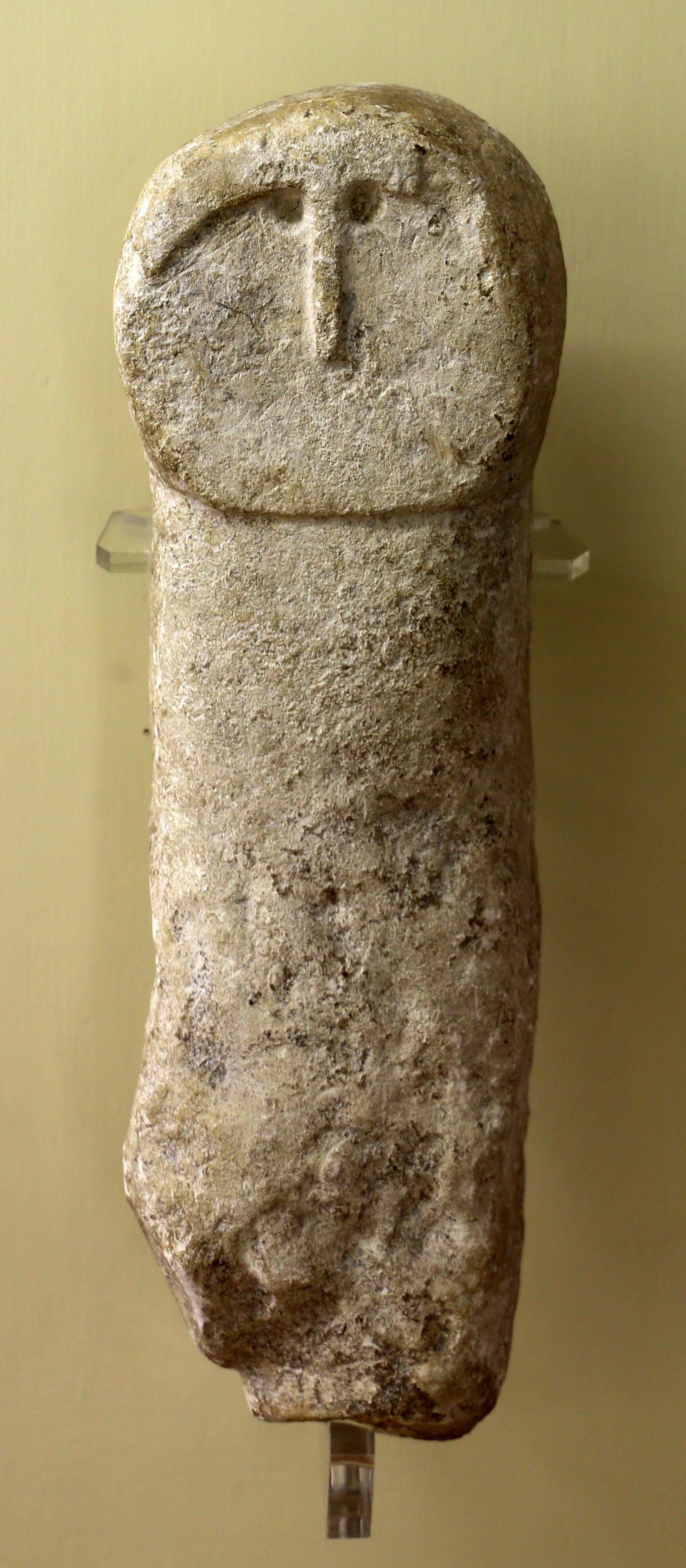 Museo civico di storia naturale di Verona This is a photo of a monument which is part of cultural heritage of Italy.